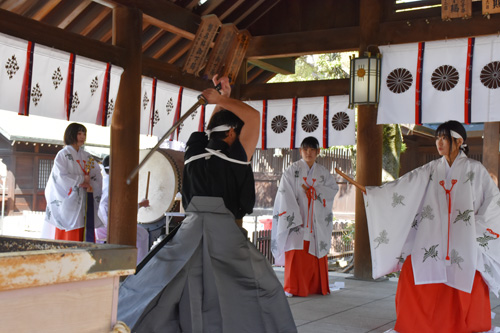 柳生神影流：奉納演舞の様子（平成30年3月10日和泉国一之宮大鳥大社に於いて）